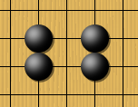 Bamboo joint